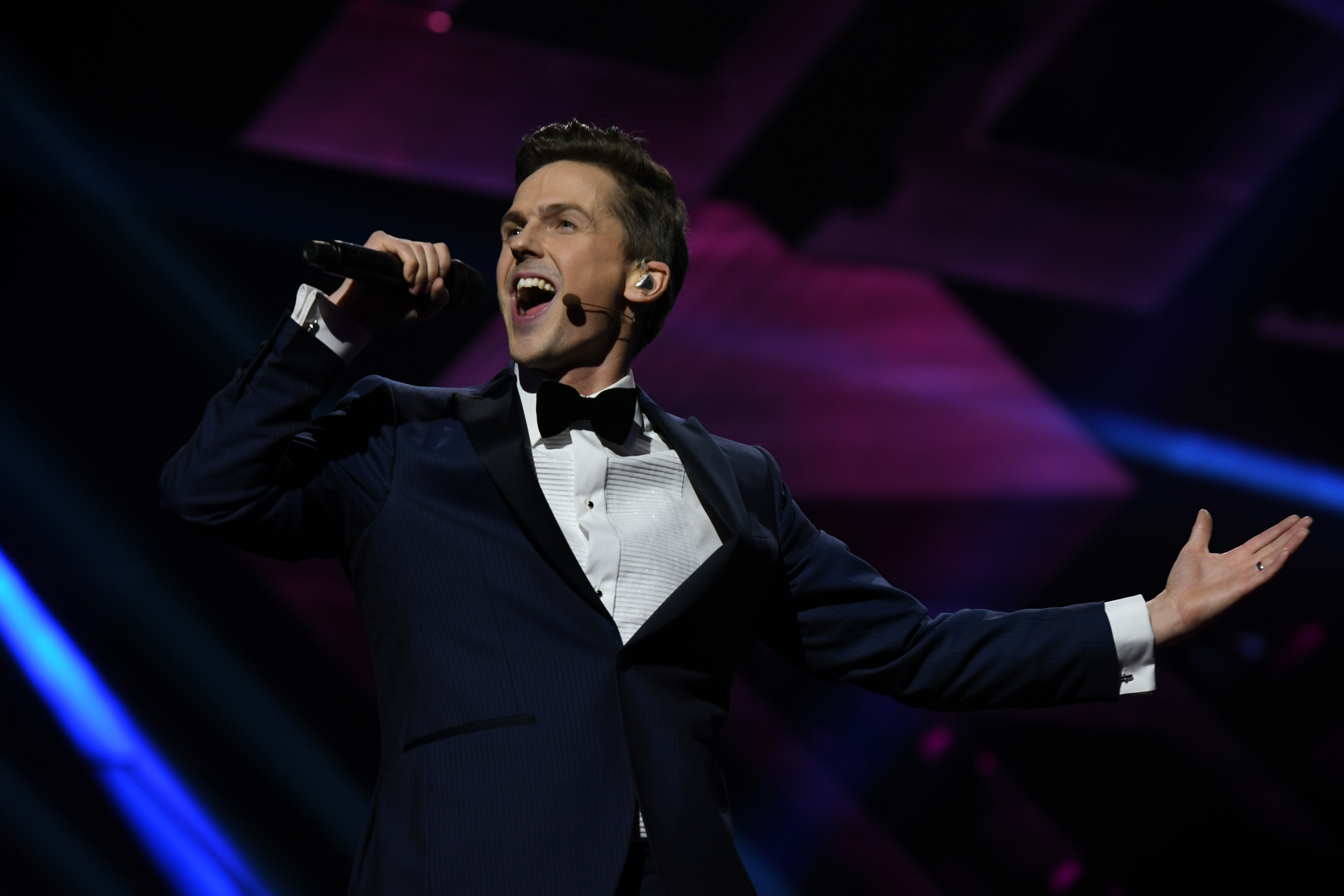 Andra chansen repetitionerna på fredagen.